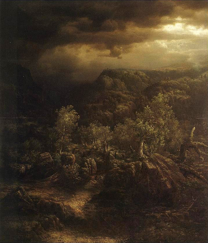 Rullstaddjuvetlabel QS:Len,"Rullstaddjuvet" label QS:Lnb,"Rullstaddjuvet"